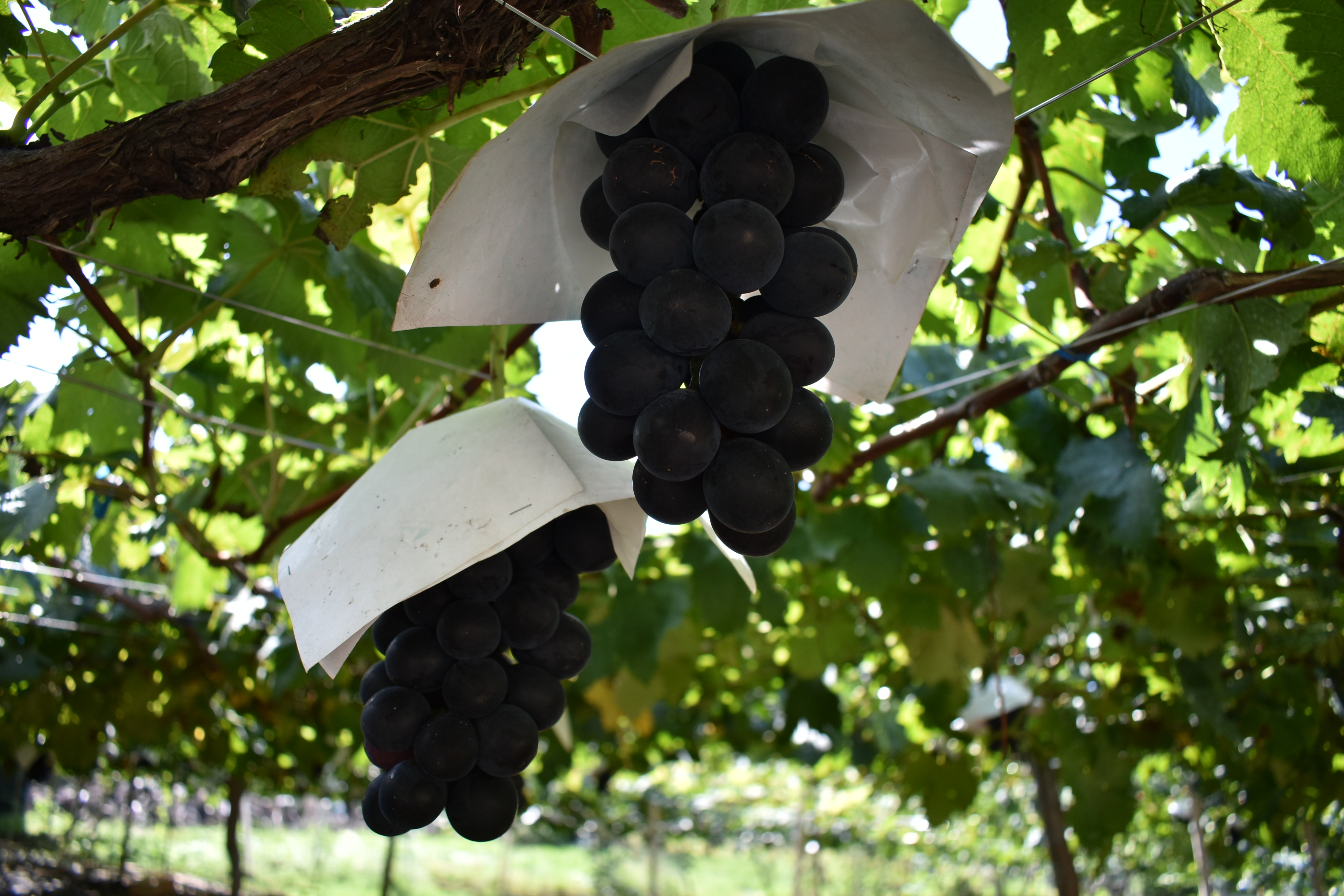 丸藤葡萄酒工業